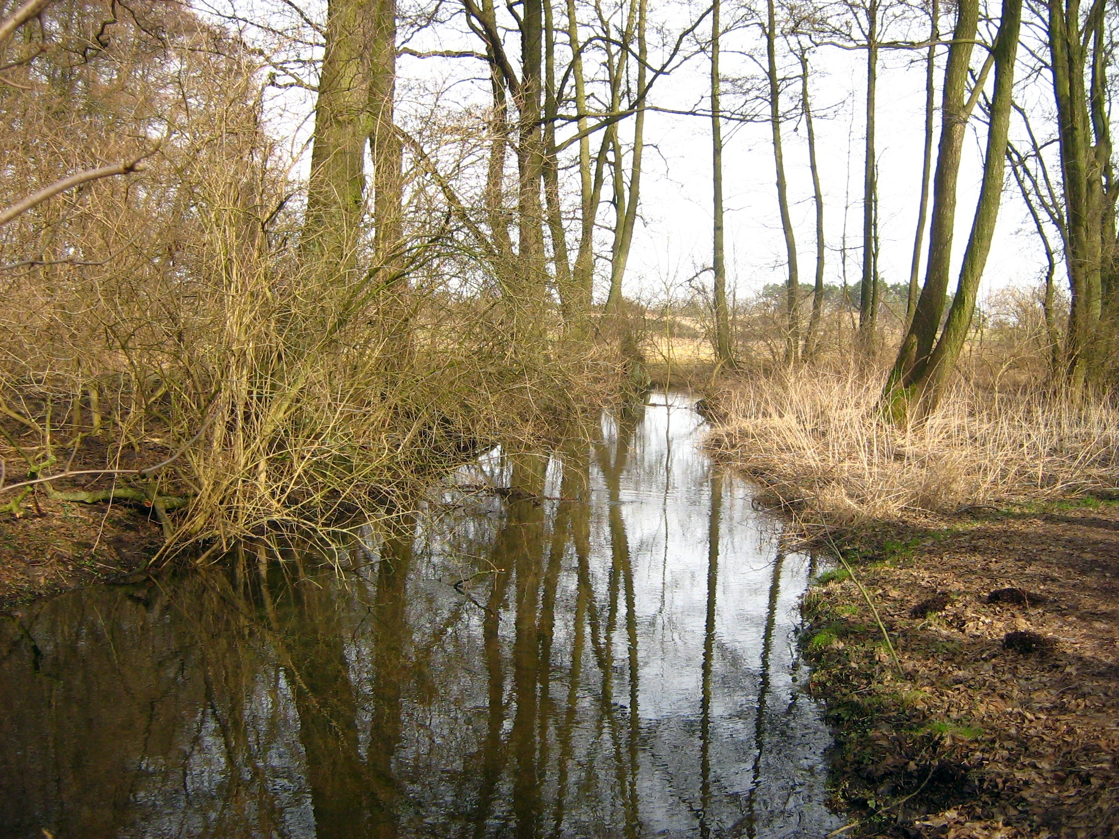 Der Schillerbach kurz vor seiner Mündung in den Löcknitzer See.